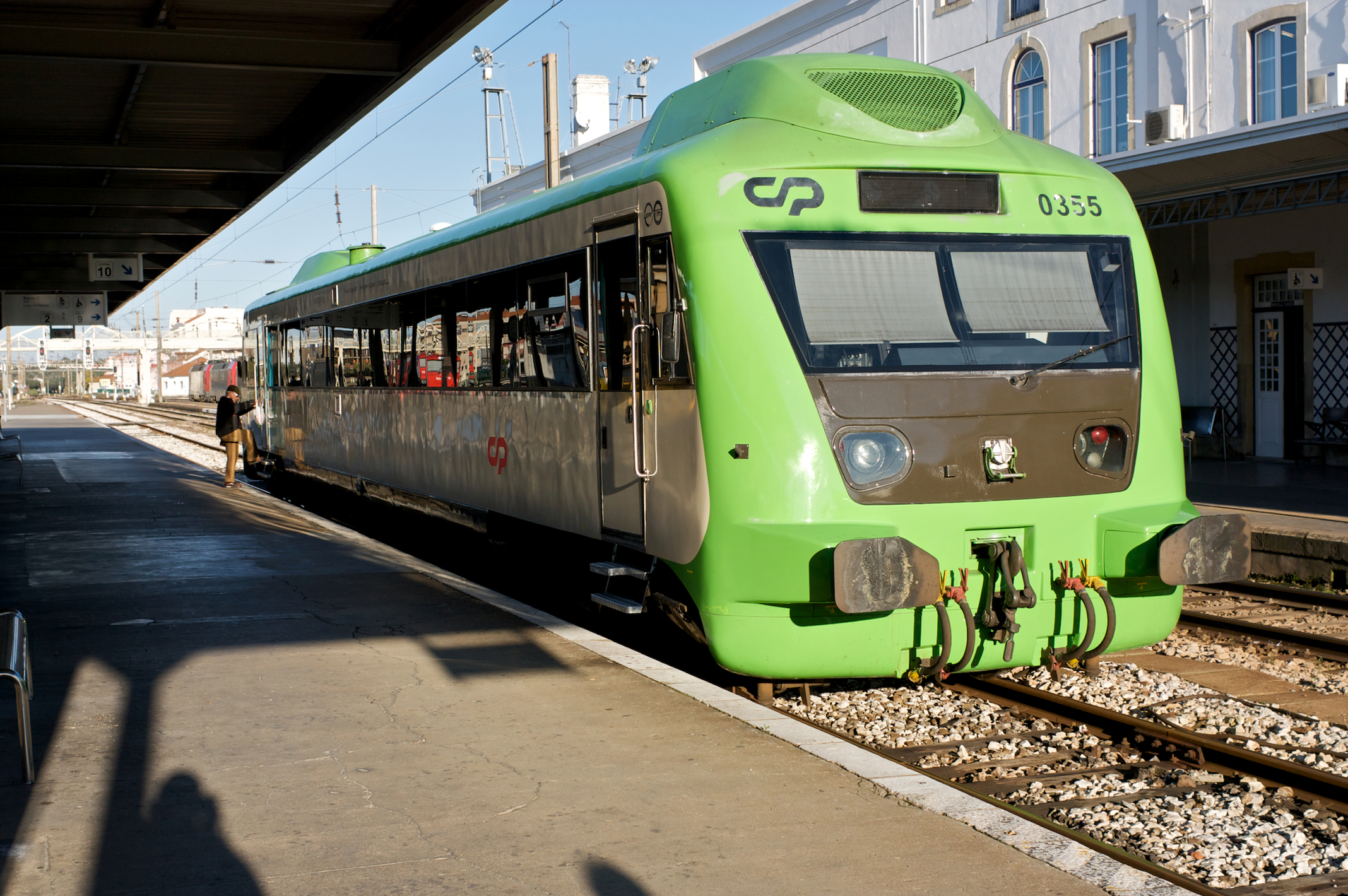 Tipo: Comboio Regional 4515 [Entroncamento - Coimbra–B] Local: Estação do Entroncamento [Linha do Norte, PK 106] Data e hora: 19 de Dezembro de 2009 [15h40] Material: Automotora 0355 [Unidade Simples Diesel - Allan Renovada]